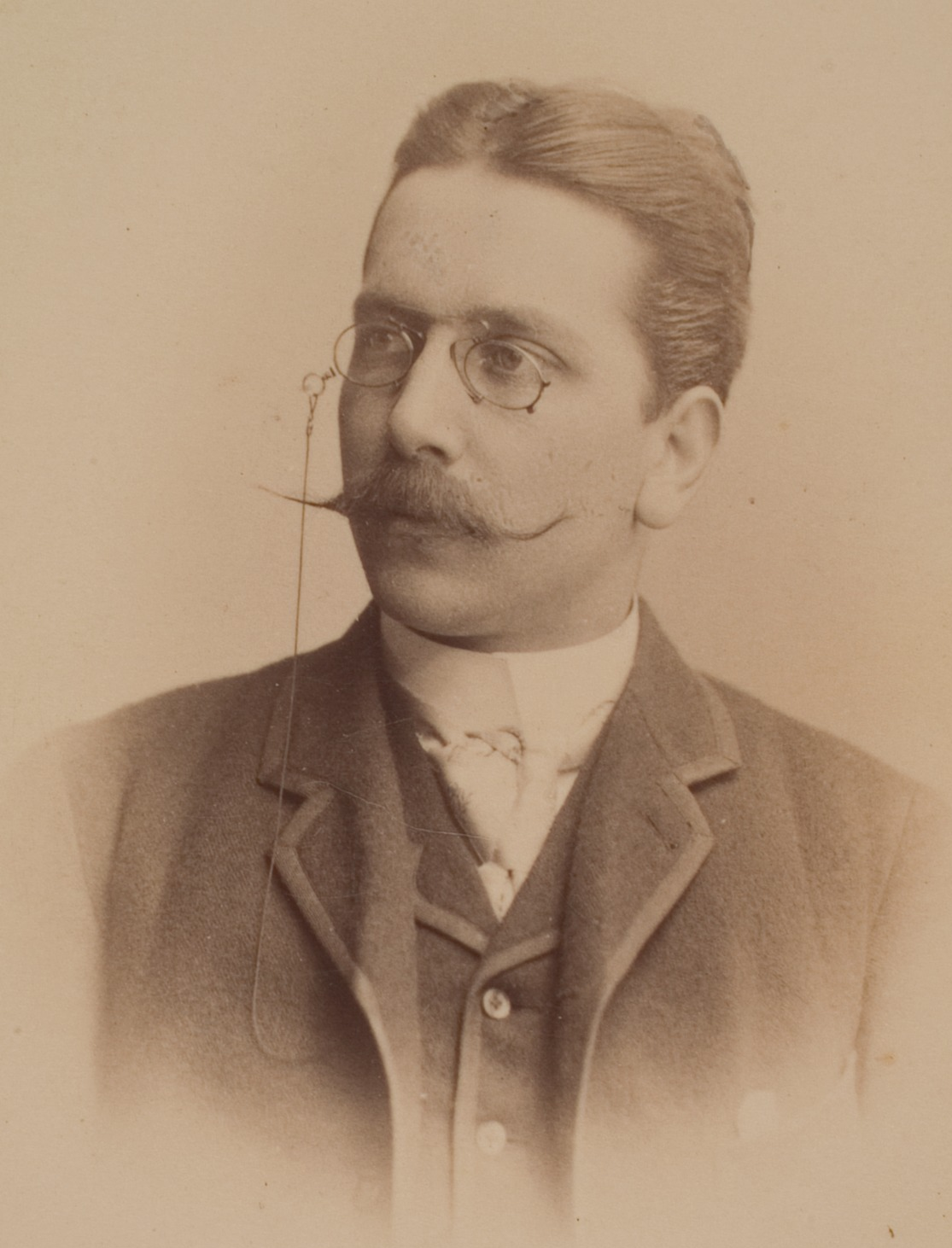 Karl Keller, Ingenieur, 1872–1880 Privatdozent in Heidelberg